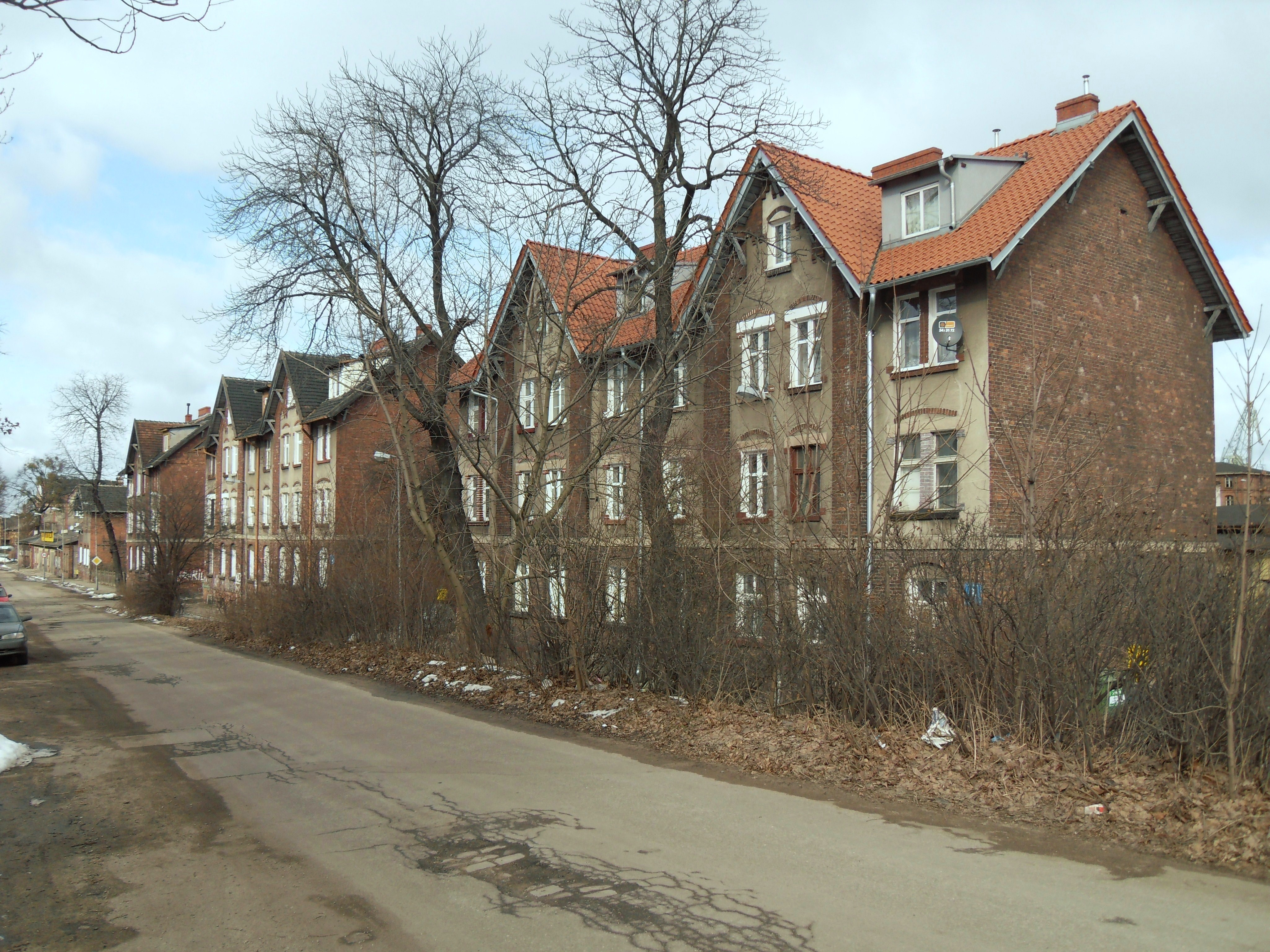 Ulica Kolejowa w Gdańsku (dzielnica Aniołki), historyczna zabudowa.